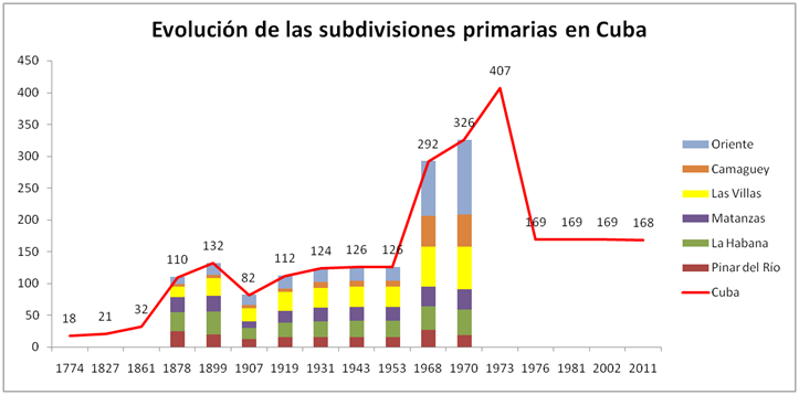 Evolución de las subdivisiones primarias de Cuba en el tiempo siglo XVIII-XXI. Jurisdicciones y municipios.